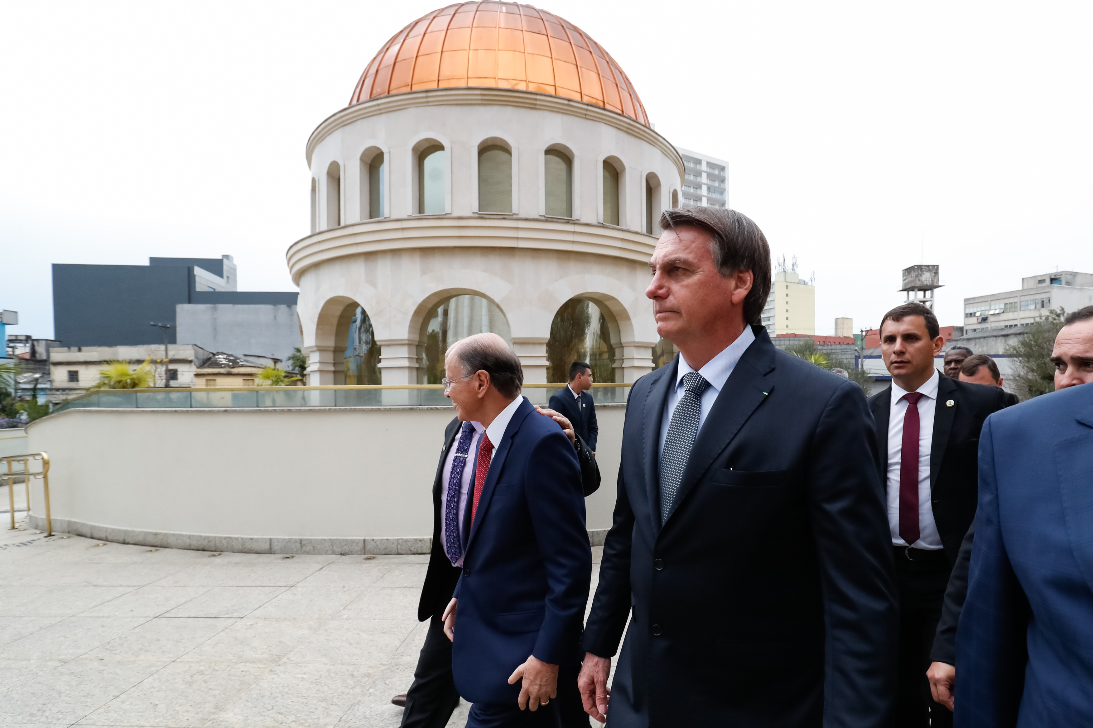 (São Paulo - SP, 01/09/2019) Presidente da República, Jair Bolsonaro durante visita ao Templo de Salomão. Foto: Alan Santos/PR